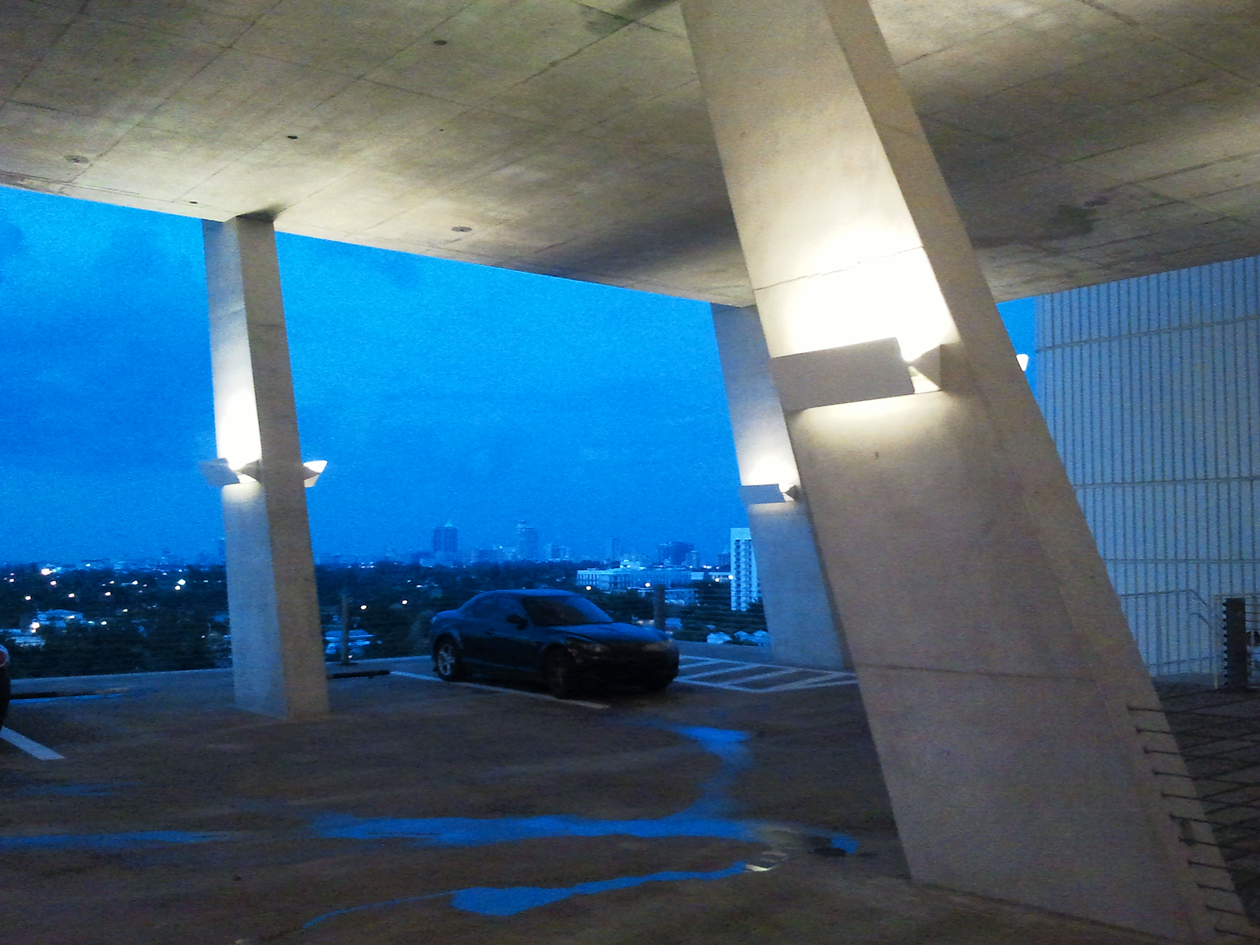 Parkhaus Lincoln Road Miami Beach